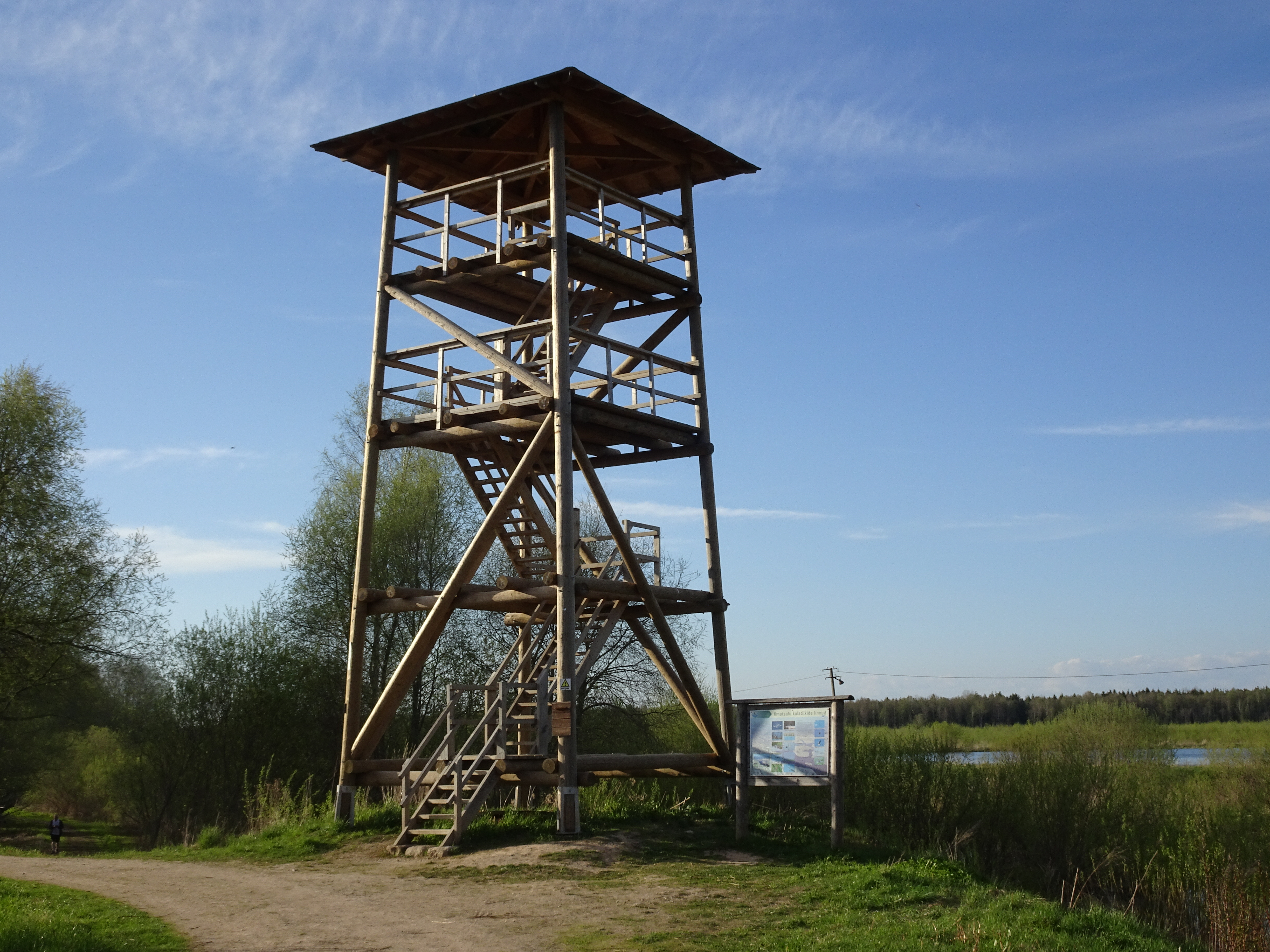 Ilmatsalu linnutorn